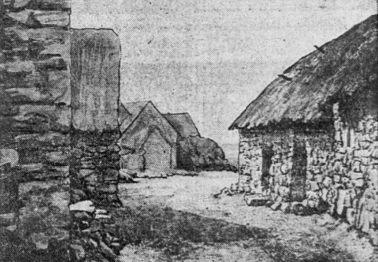 Habitations au Cap de la Chèvre (photographie datant de 1930)